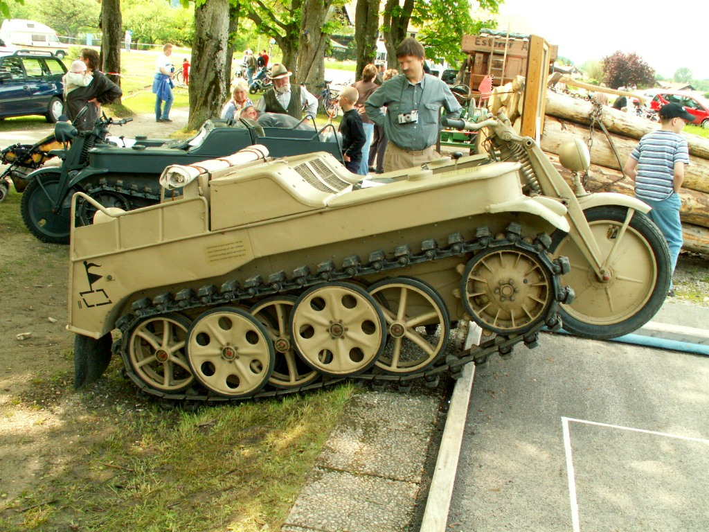 Kettenkrad (1944) Quelle: selbst fotografiert, 05/2005 Fotograf: Späth Chr.